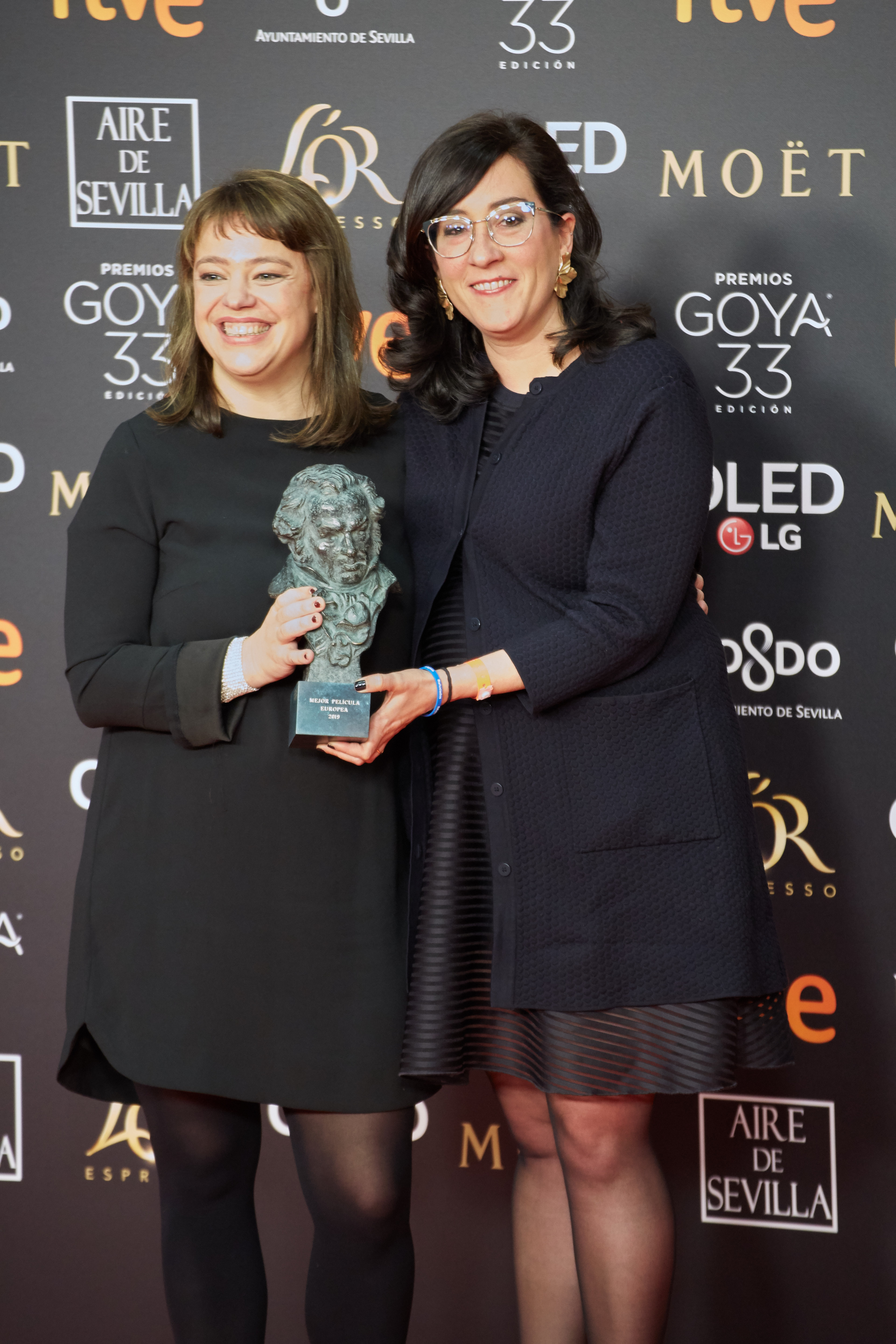 Goya 2019 a la Mejor Película Europea por Cold War